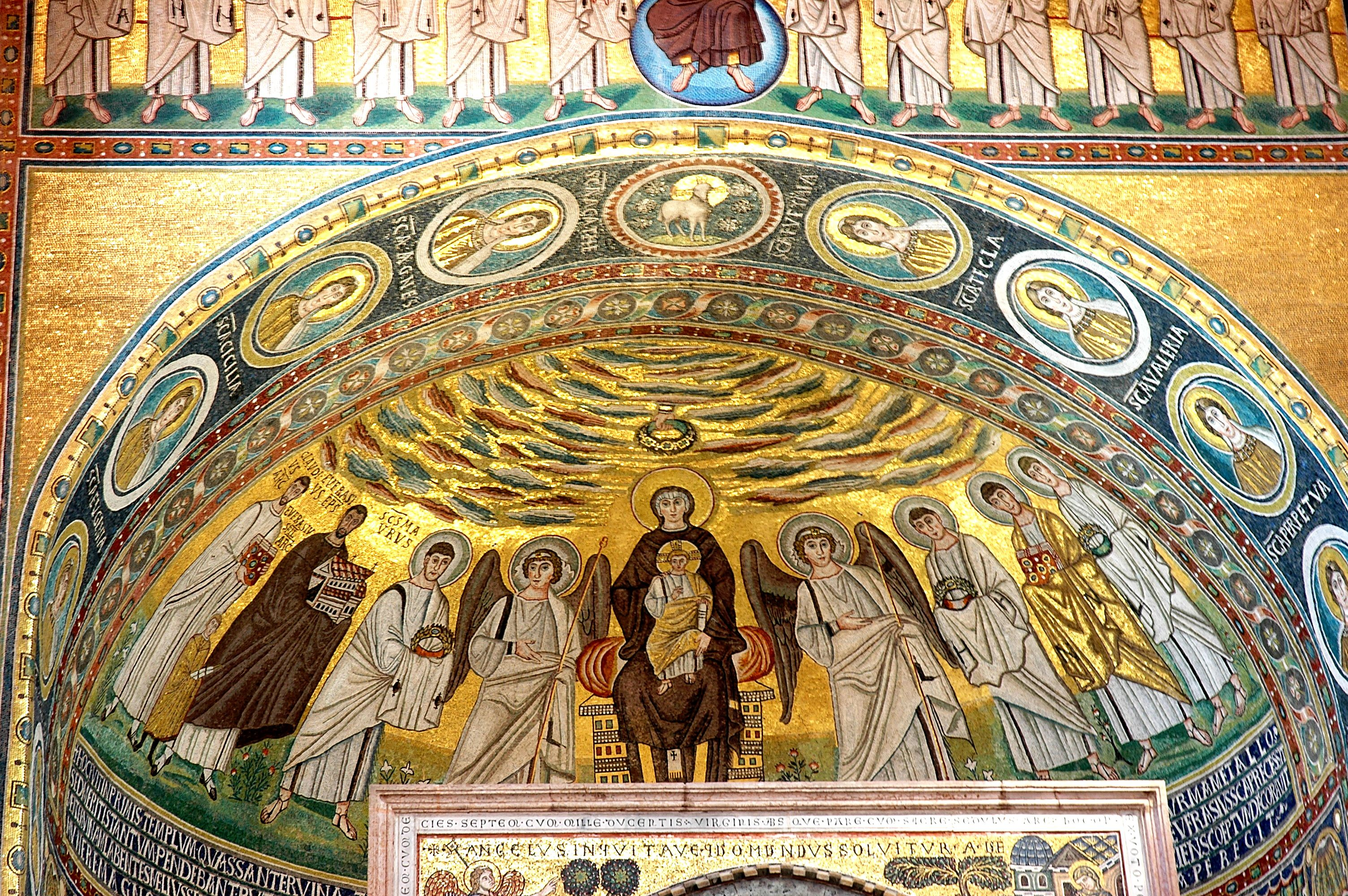 Poreč - Basílica Eufrasiana - Mosaics de l'absis